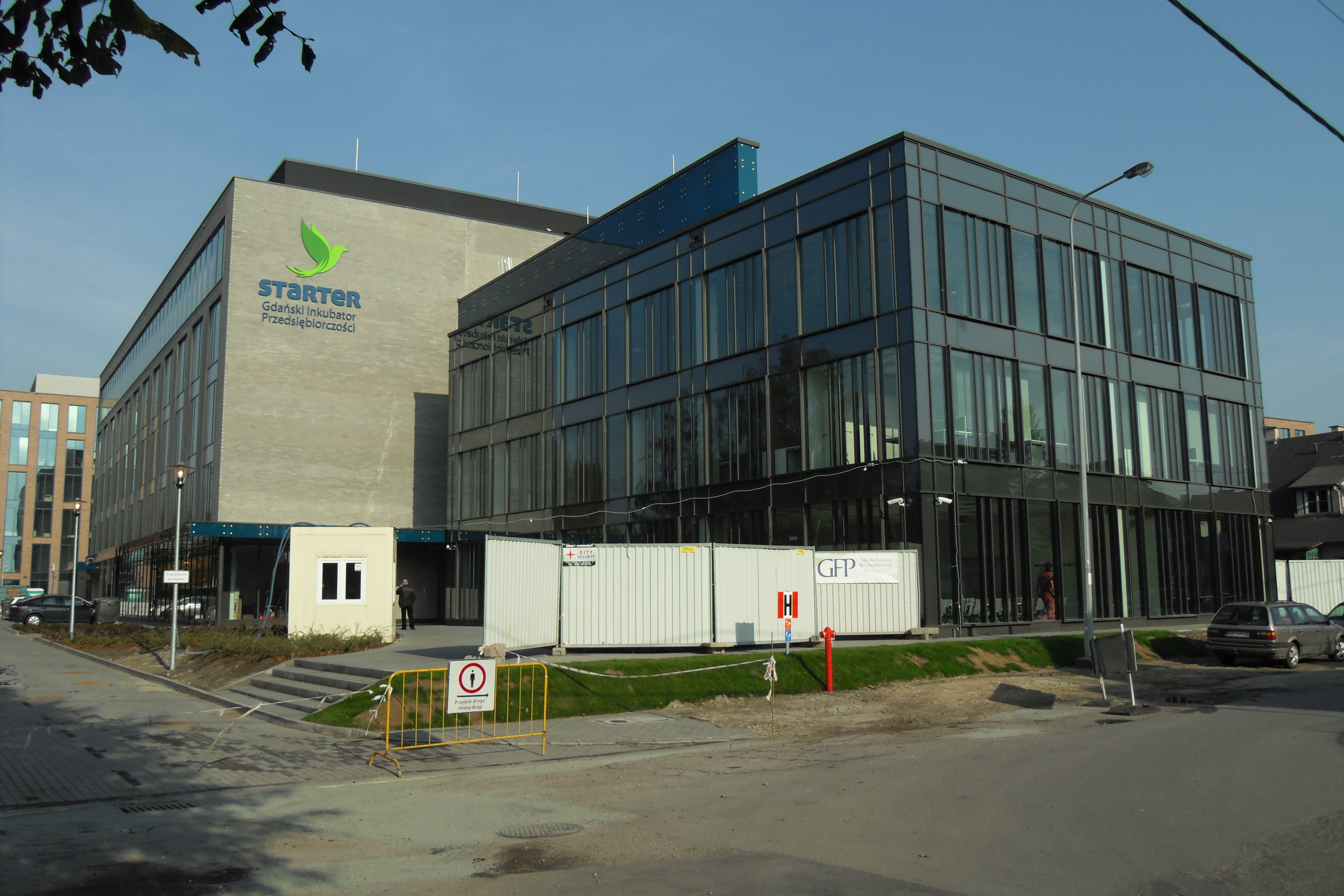 Gdańsk Przymorze Małe. Gdański Inkubator Przedsiębiorczości STARTER, ul. Lęborska 3b.